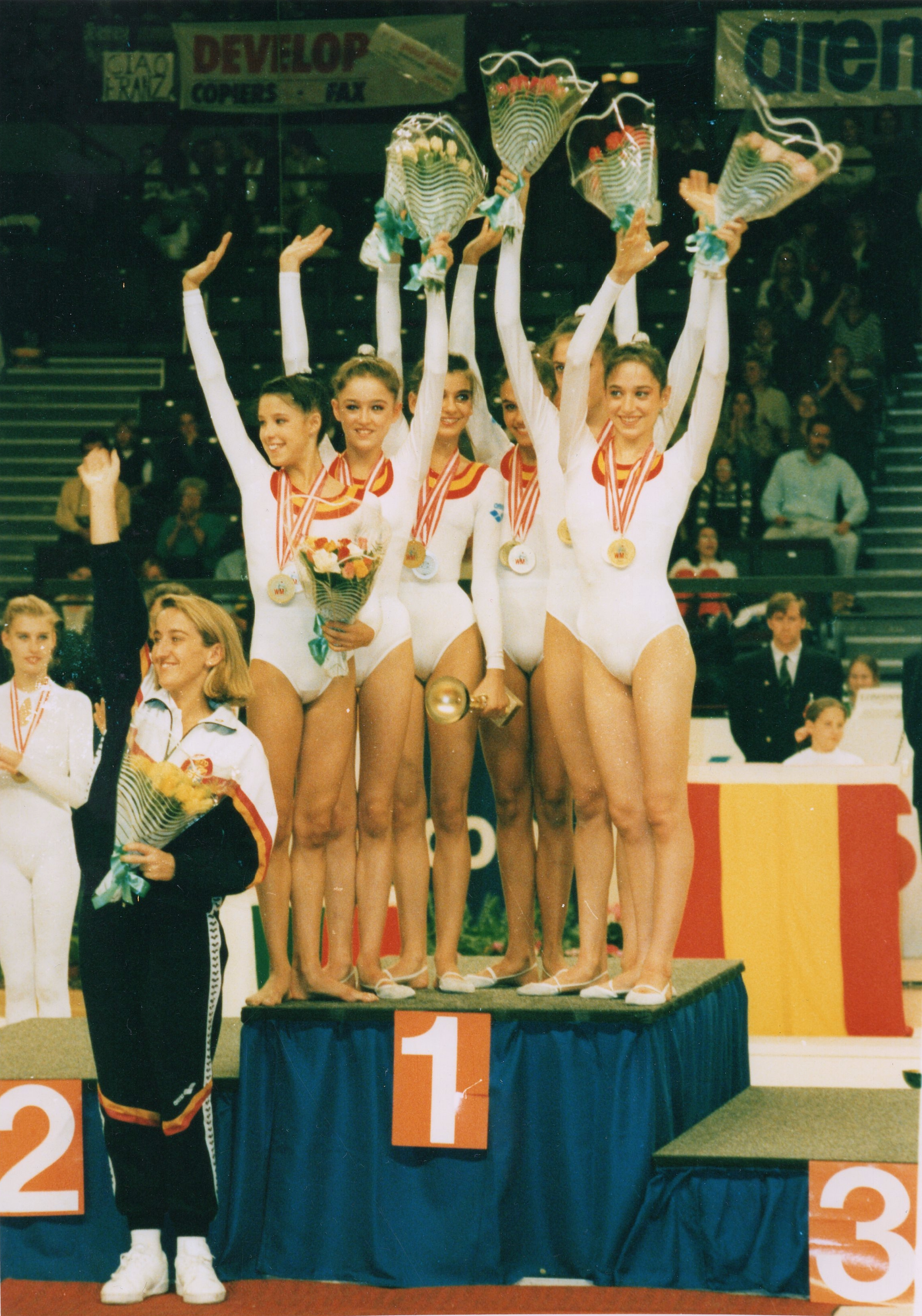 Conjunto español de gimnasia rítmica en el podio de 3 pelotas y 2 cintas del Mundial de Viena en 1995. Foto facilitada por María Fernández Ostolaza.